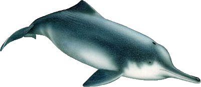 Lipotes vexillifer